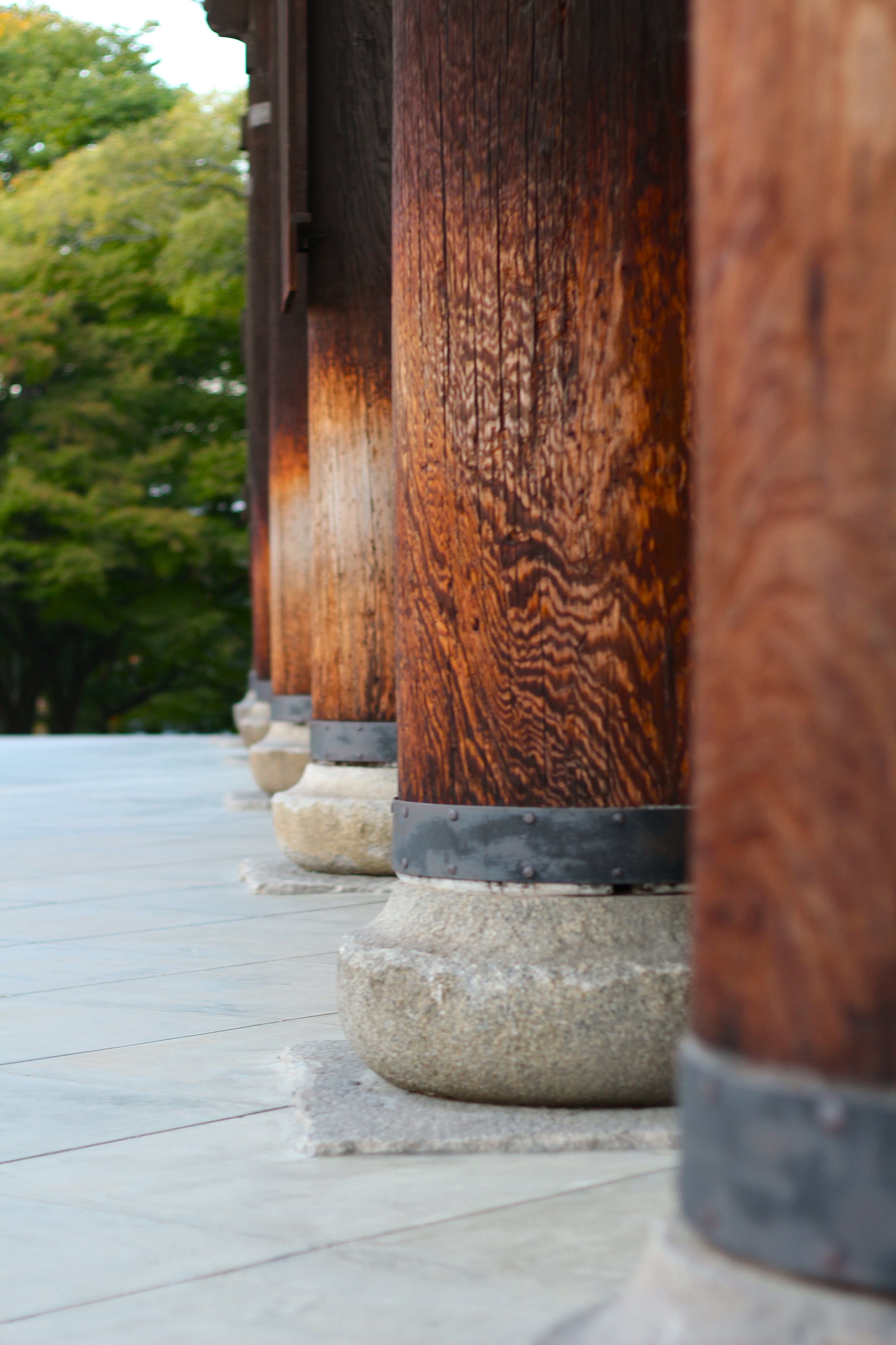 歴史を感じる三門の柱